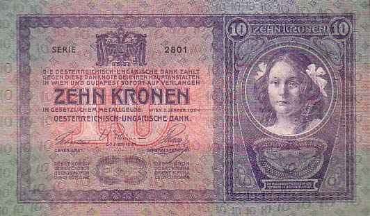 10 Austro-Hungarian Krone/korona (1904) - obverse